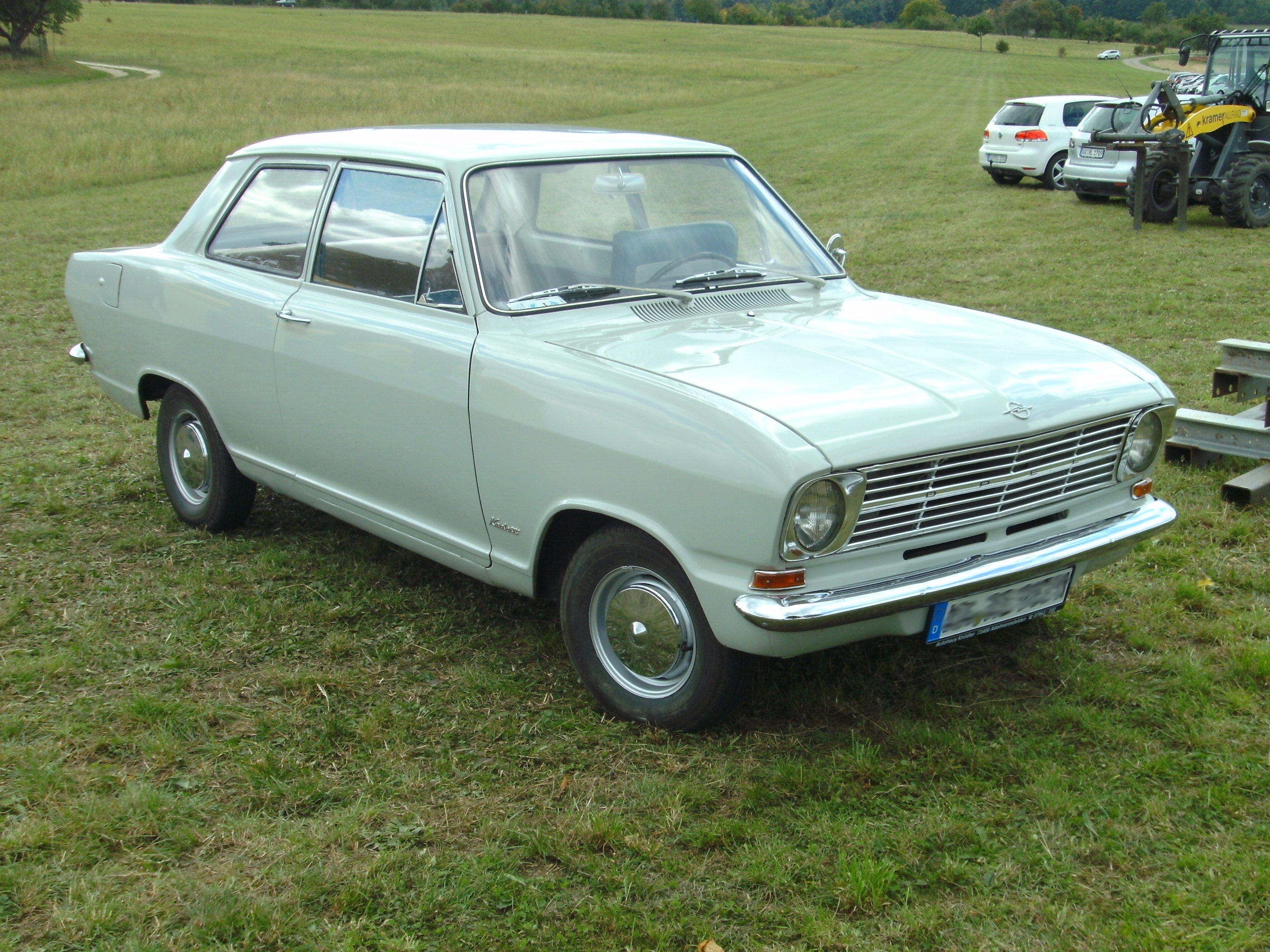 Opel Kadett B